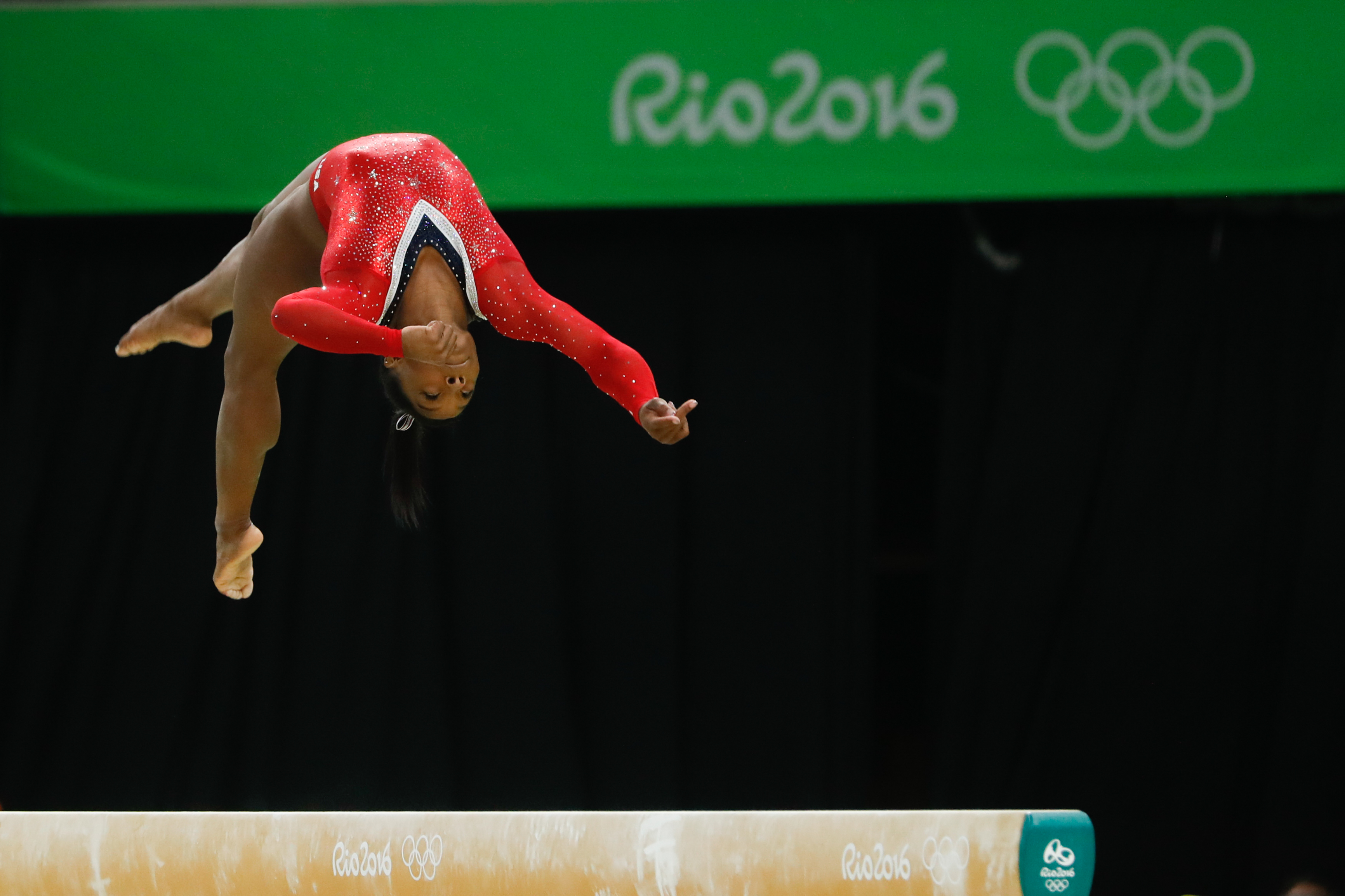 Rio de Janeiro - Ginasta Simone Biles, dos Estados Unidos, termina com medalha de bronze a prova final da trave (Fernando Frazão/Agência Brasil)